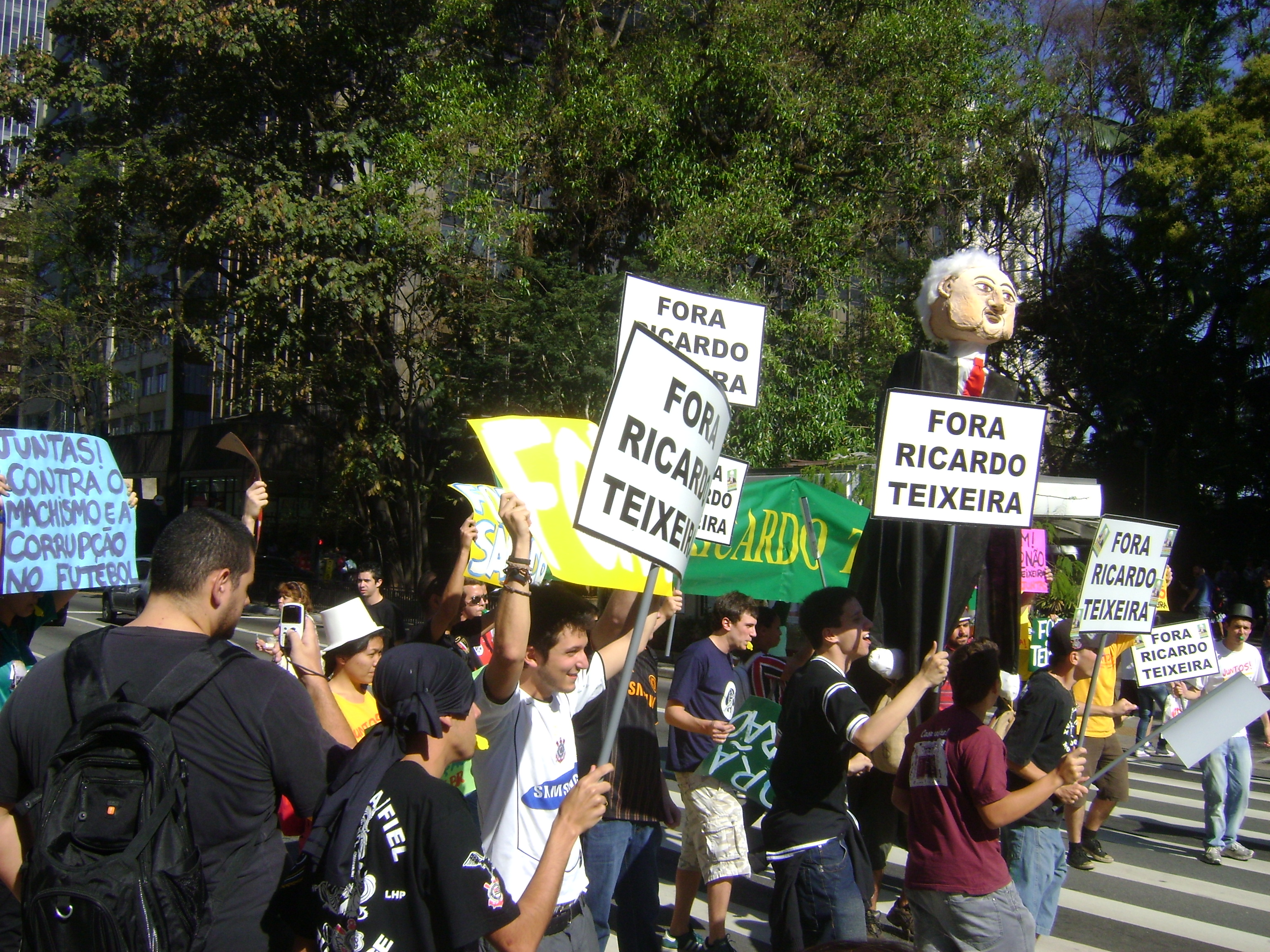 Passeata na Avenida Paulista contra a permanência de Ricardo Teixeira à frente da CBF.